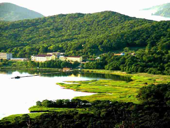 van russische wiki nl::ru:Изображение:Russkiy island.jpg